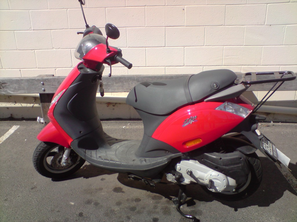 Piaggio Zip 50 (4 stroke)